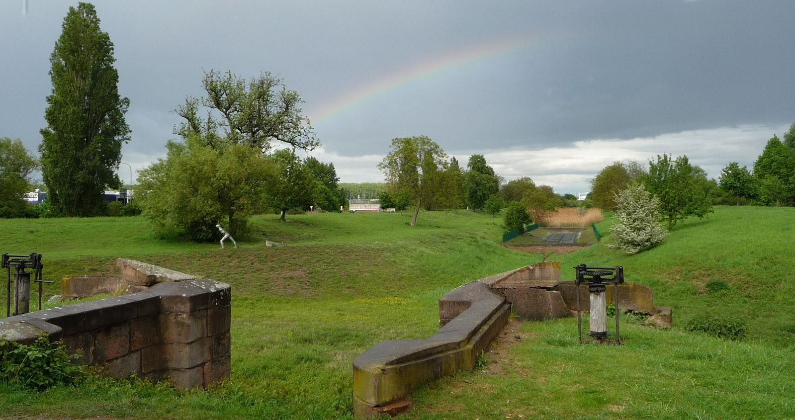 alter Frankenthaler Kanal